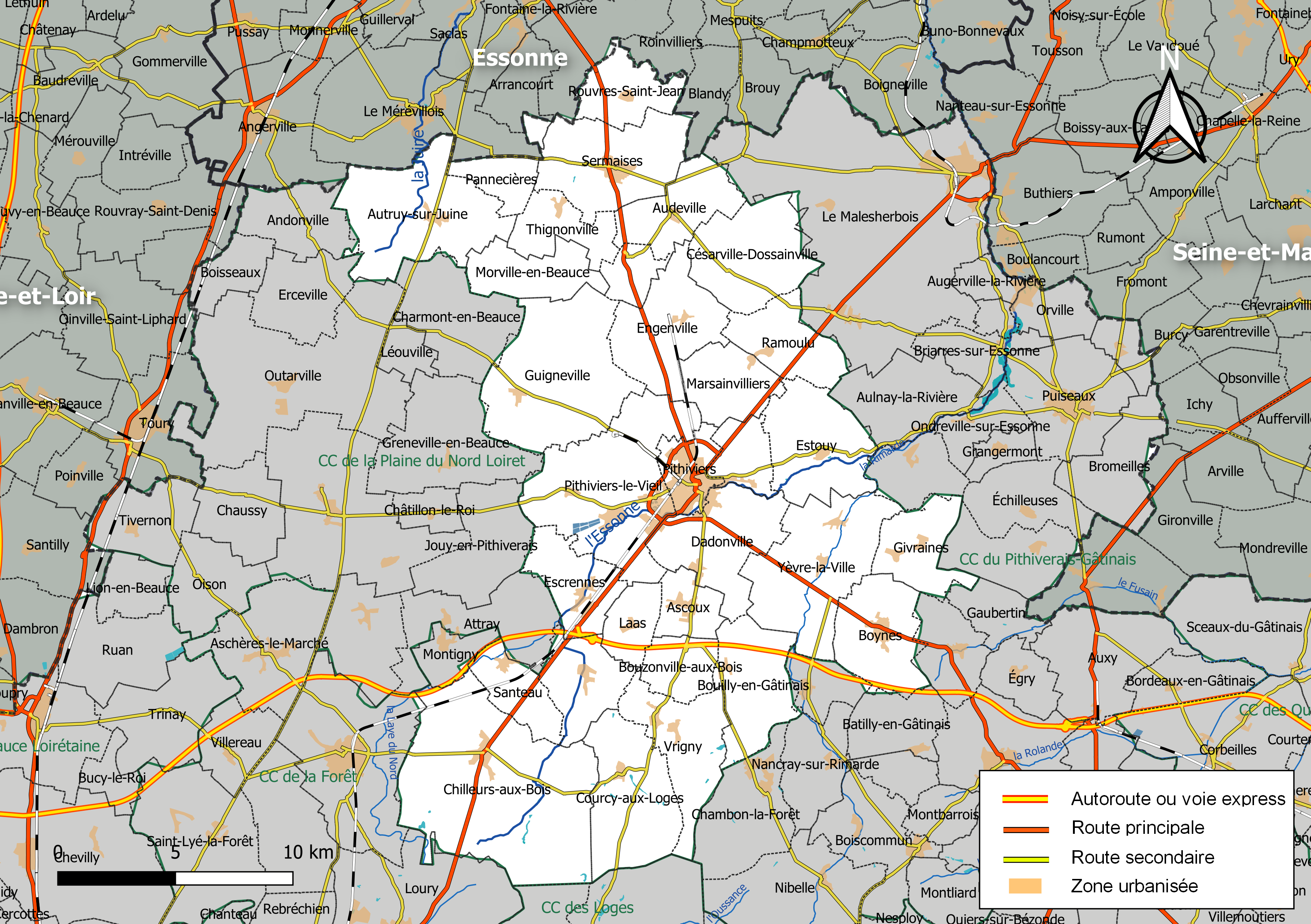 Carte géographique de la communauté de communes du Pithiverais, département du Loiret, France. Composition au 1er janvier 2019.